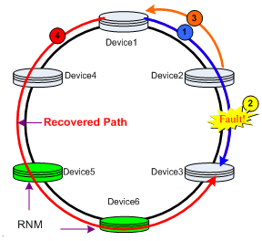 링형에서의_복구